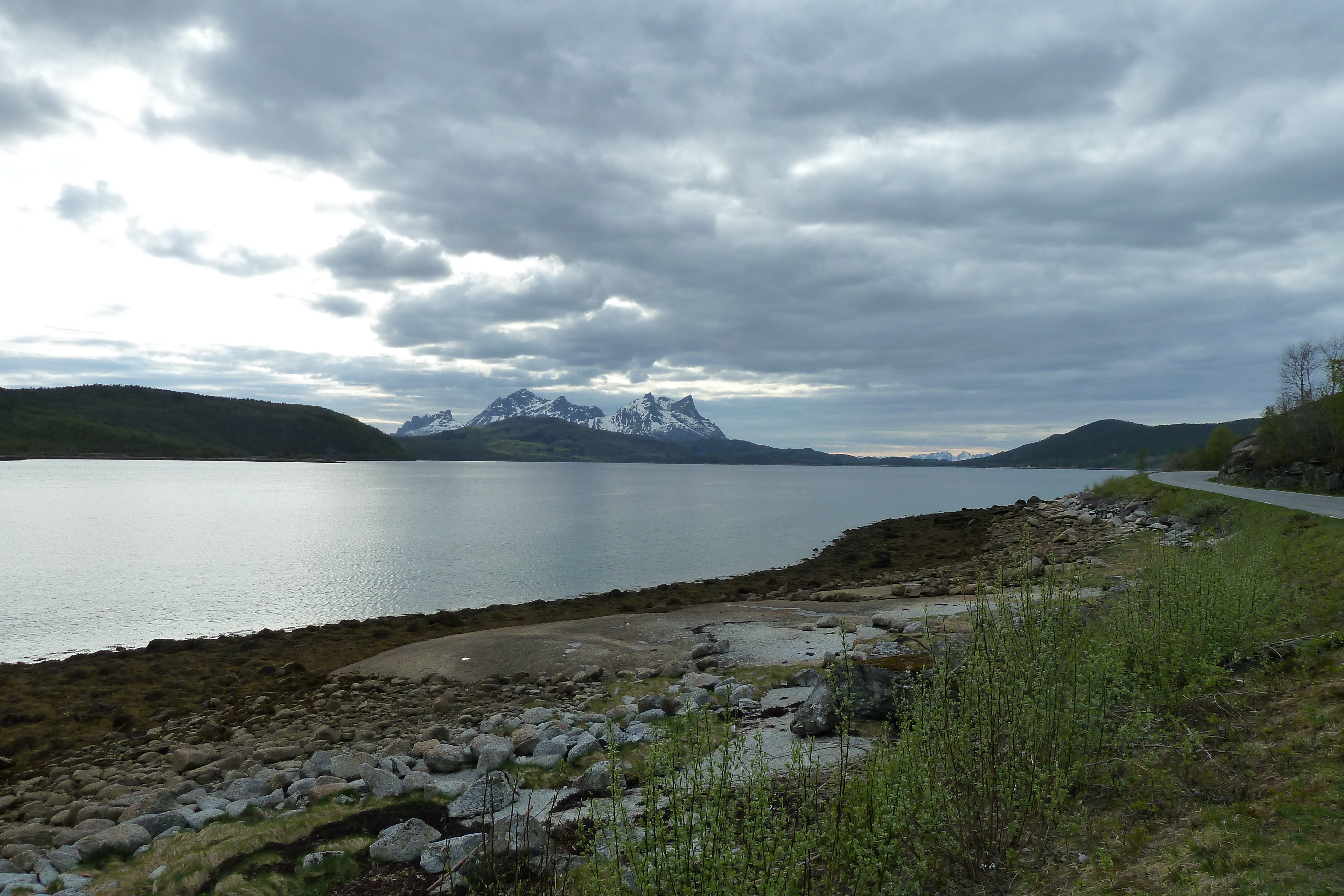 Presteidfjorden i Hamarøy.